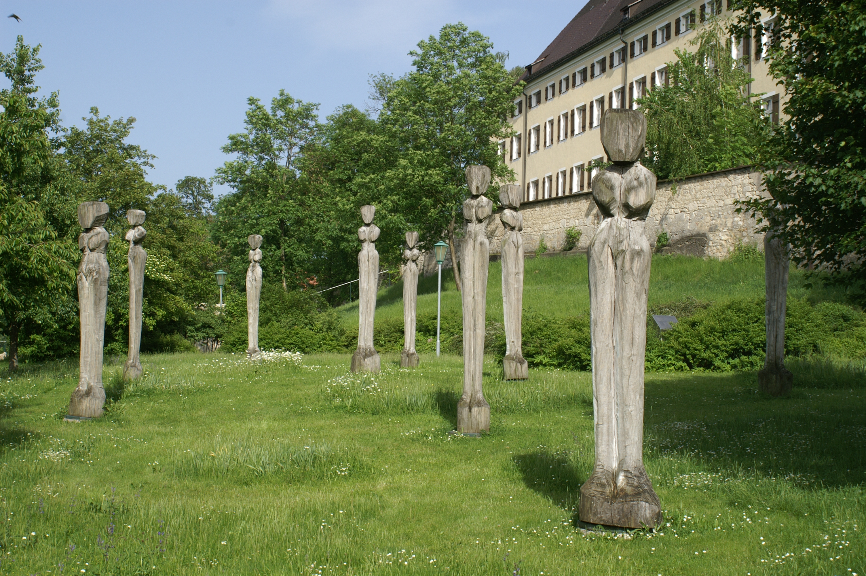 Die Groggensee-Skulpturen stehen in der Parkanlage mitten in Ehingen (Donau). Die neun Figuren sind aus Pappeln hergestellt und wurden von dem Basler Künstler Stefan Hübscher für die Landesgartenschau 1999 in Weil am Rhein geschaffen. Seit dem Jahr 2000 stehen die Figuren in Ehingen